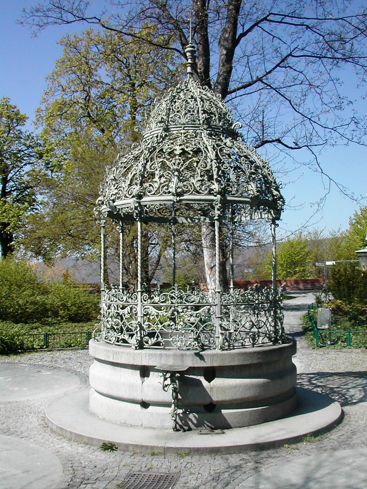 Brunnenkrone der Zisterne